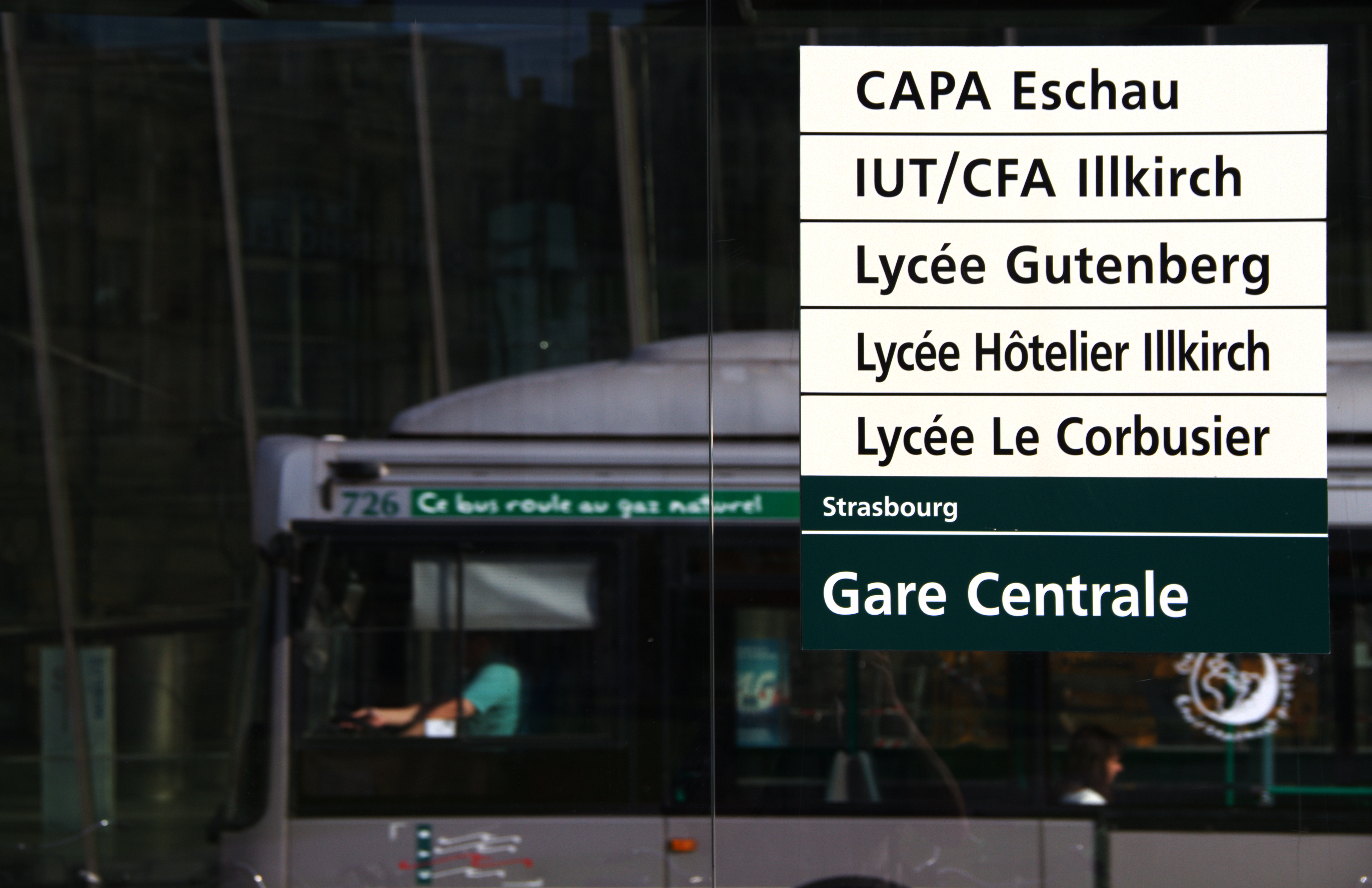 Strasbourg place de la Gare lignes de transports scolaires